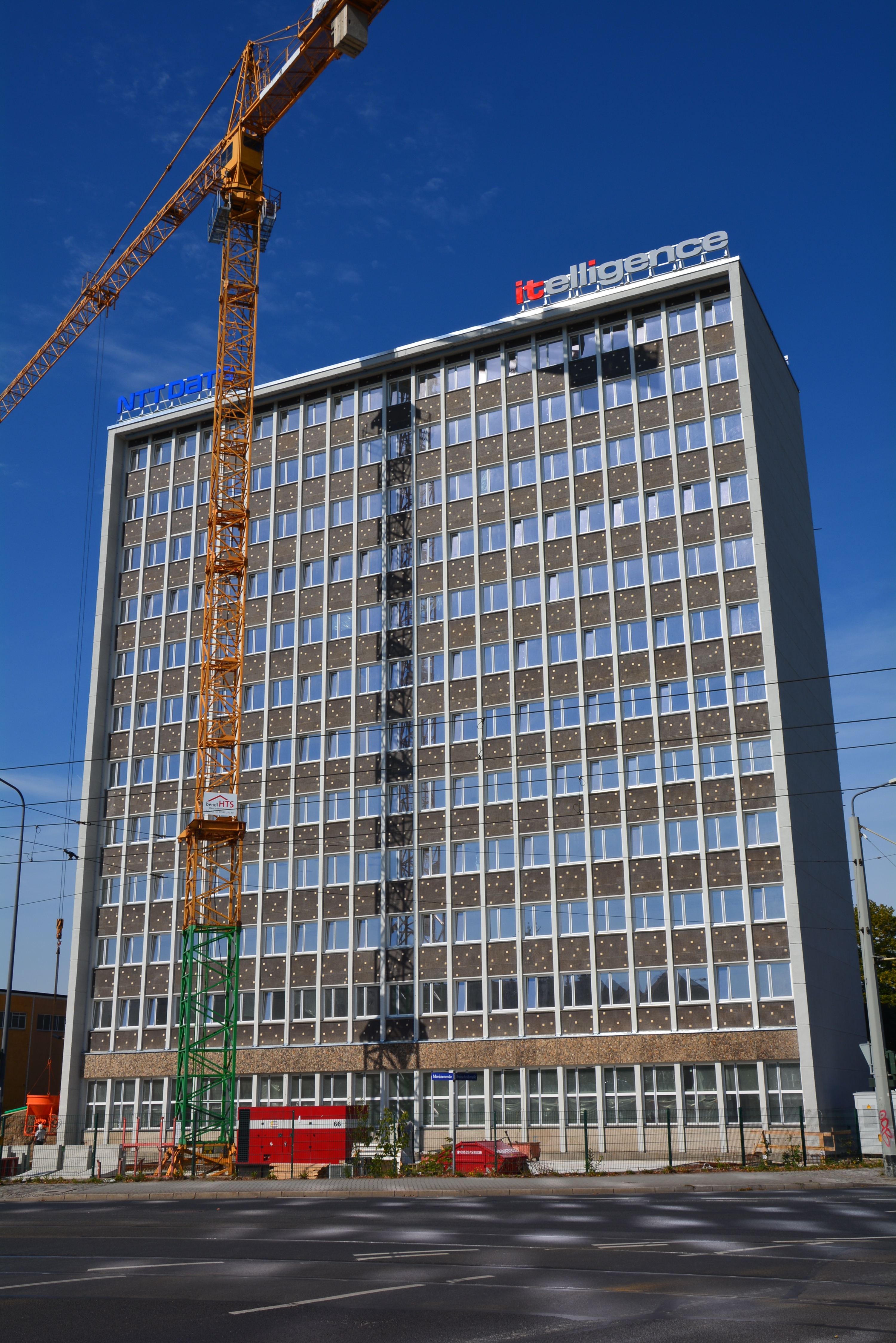 Dresden Dobritz Reick: Breitscheidstraße Schokopack-Hochhaus.Zustand am 17.September 2018